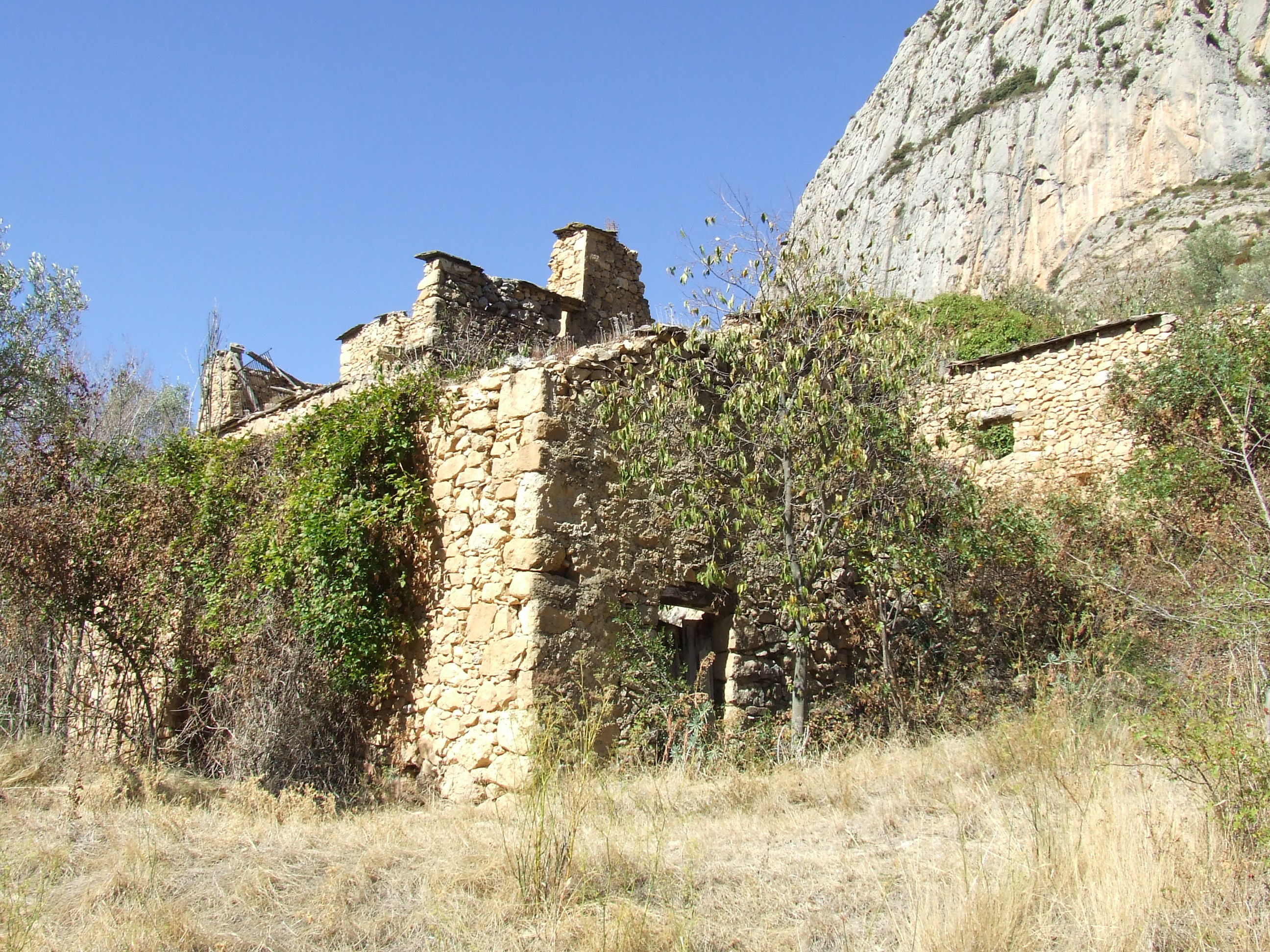 Cal Miquelet (Abella de la Conca, Pallars Jussà)